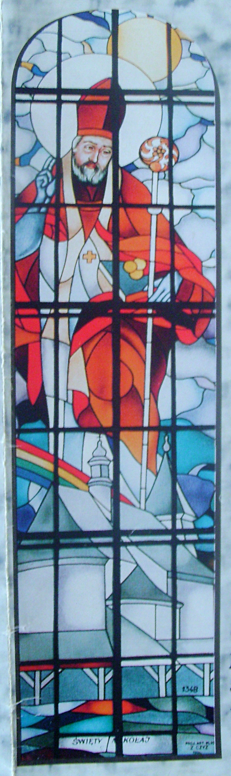 św. Mikołaj - witraż w kościele Imienia Maryi w Bączalu Dolnym (diecezja rzeszowska)